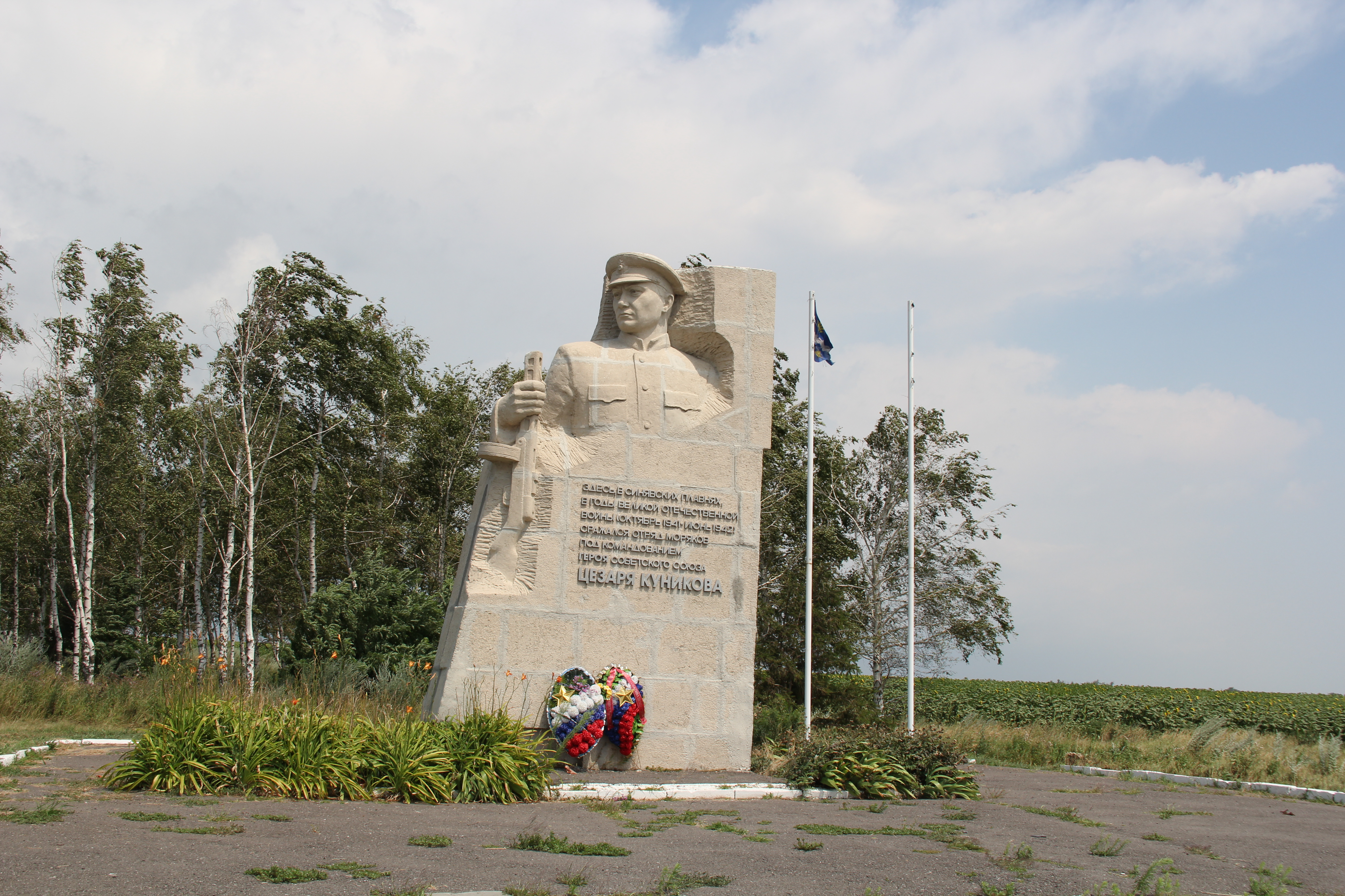 Памятник Цезарю Куникову на трассе М-23 Ростов-на-Дону - Таганрог. На памятники высечены следующие слова: "Здесь в синявских плавнях в годы Великой Отечественной войны (октябрь 1941 - июнь 1942) сражался отряд моряков под командование Героя Советского Союза Цезаря Куникова".